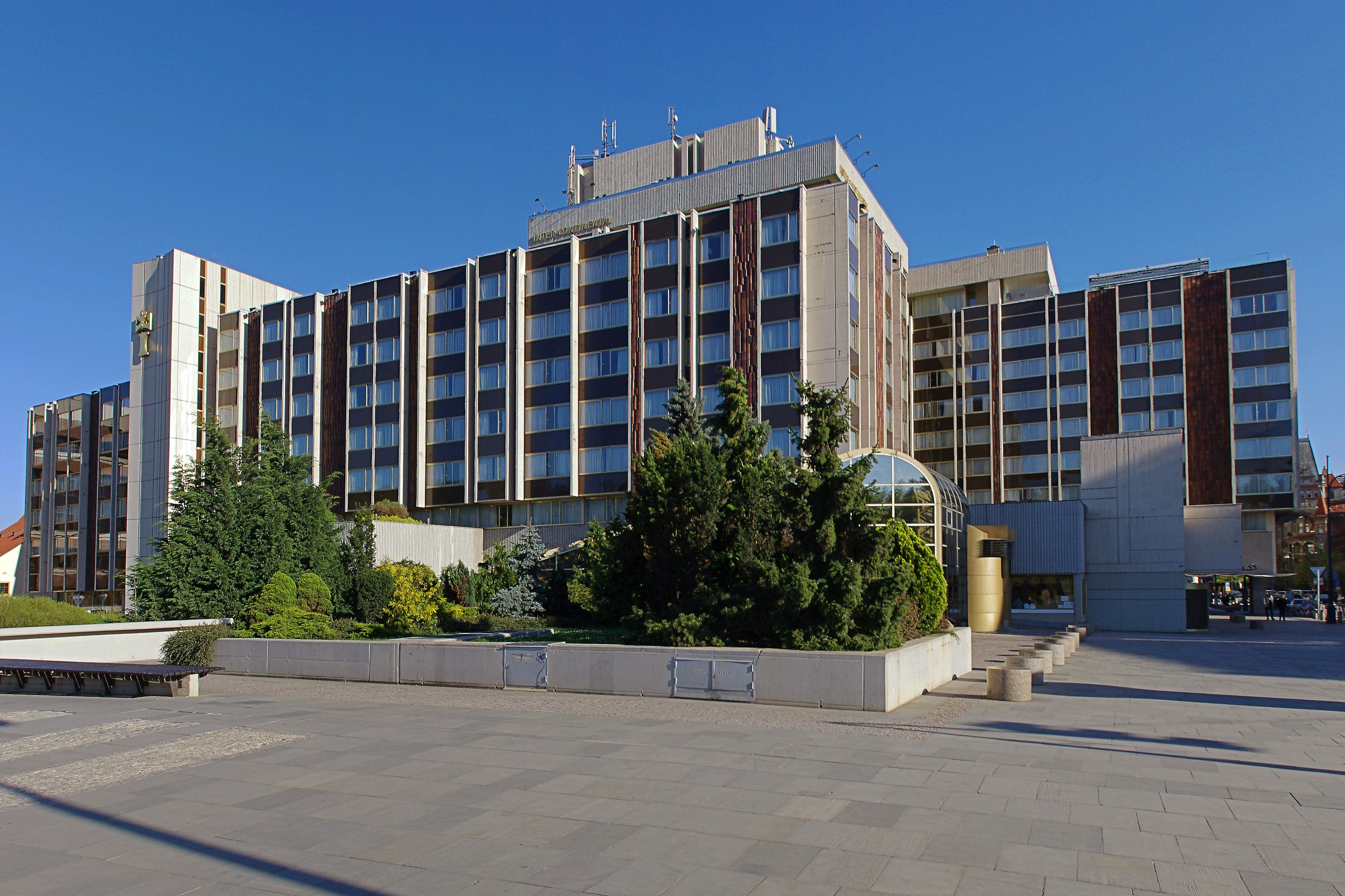 Hotel InterContinental Praha, celkový pohled